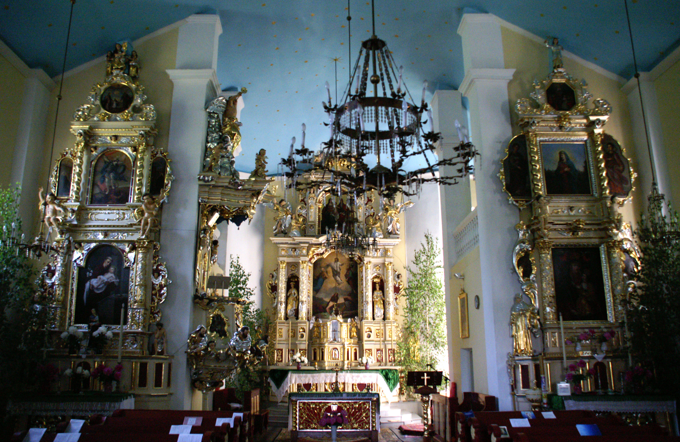 Беларуская (тарашкевіца): Праабражэнскі касьцёлдэкаратыўнае ўбраньне: альтары, амбон, арган. в. Новая Мыш This is a photo of Belarusian heritage monument. Reference number: 112Г000060 ( WLM)